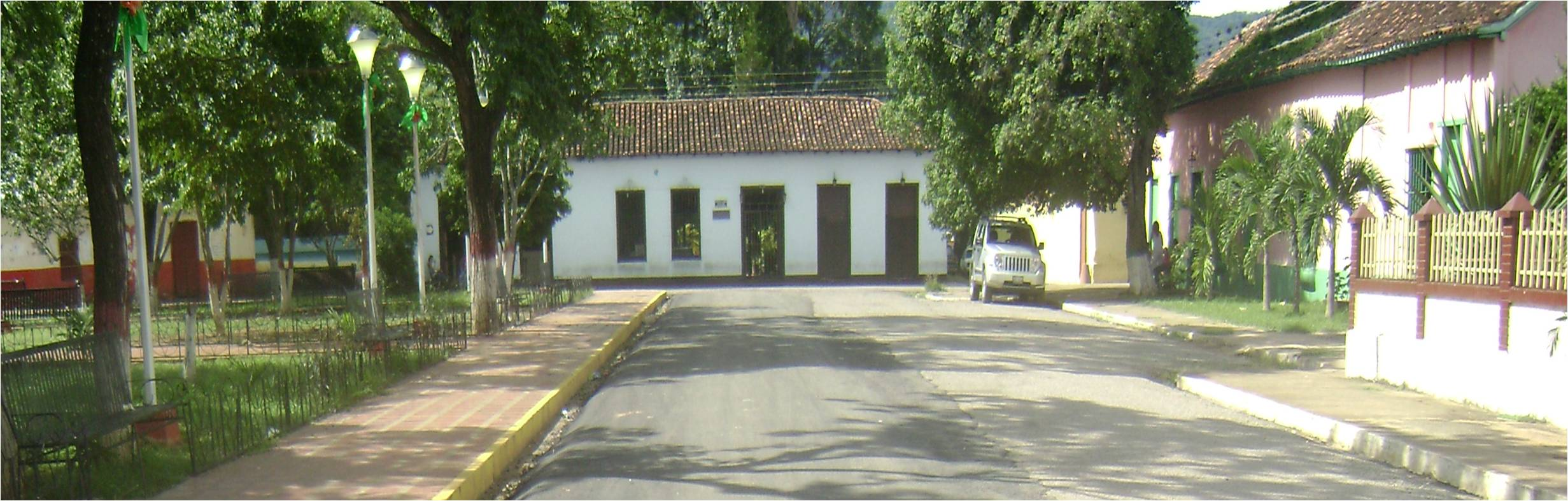 Panoramica